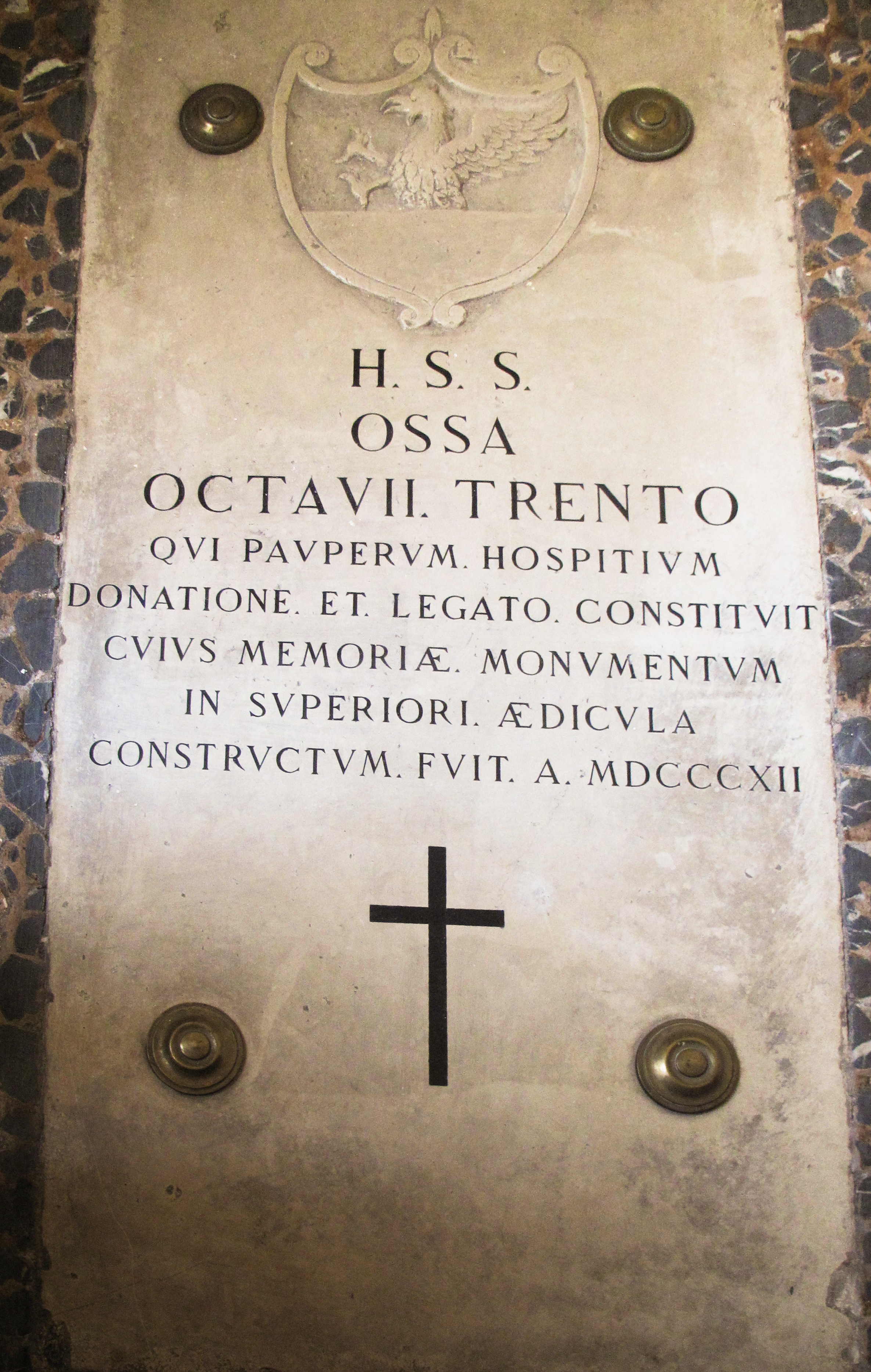 Ottavio Trento - lapide nella sede dell?Istituto